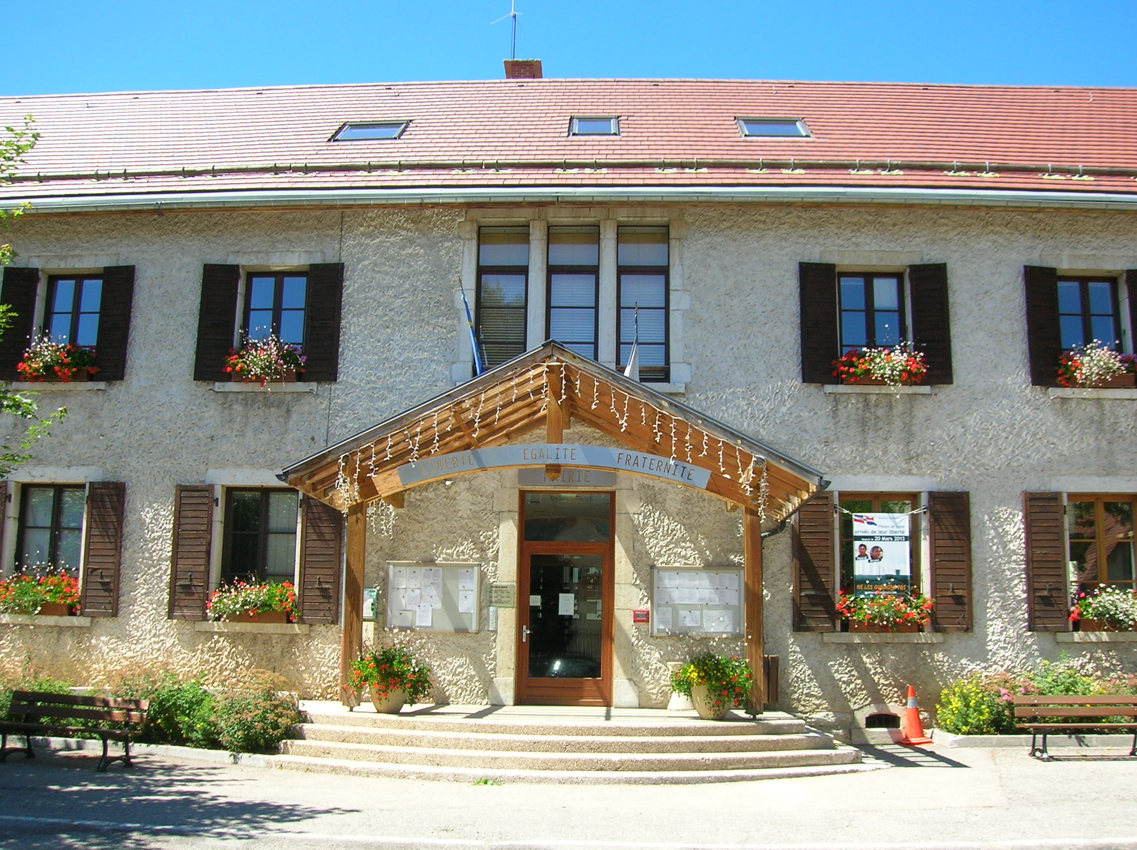 Mairie, Autrans